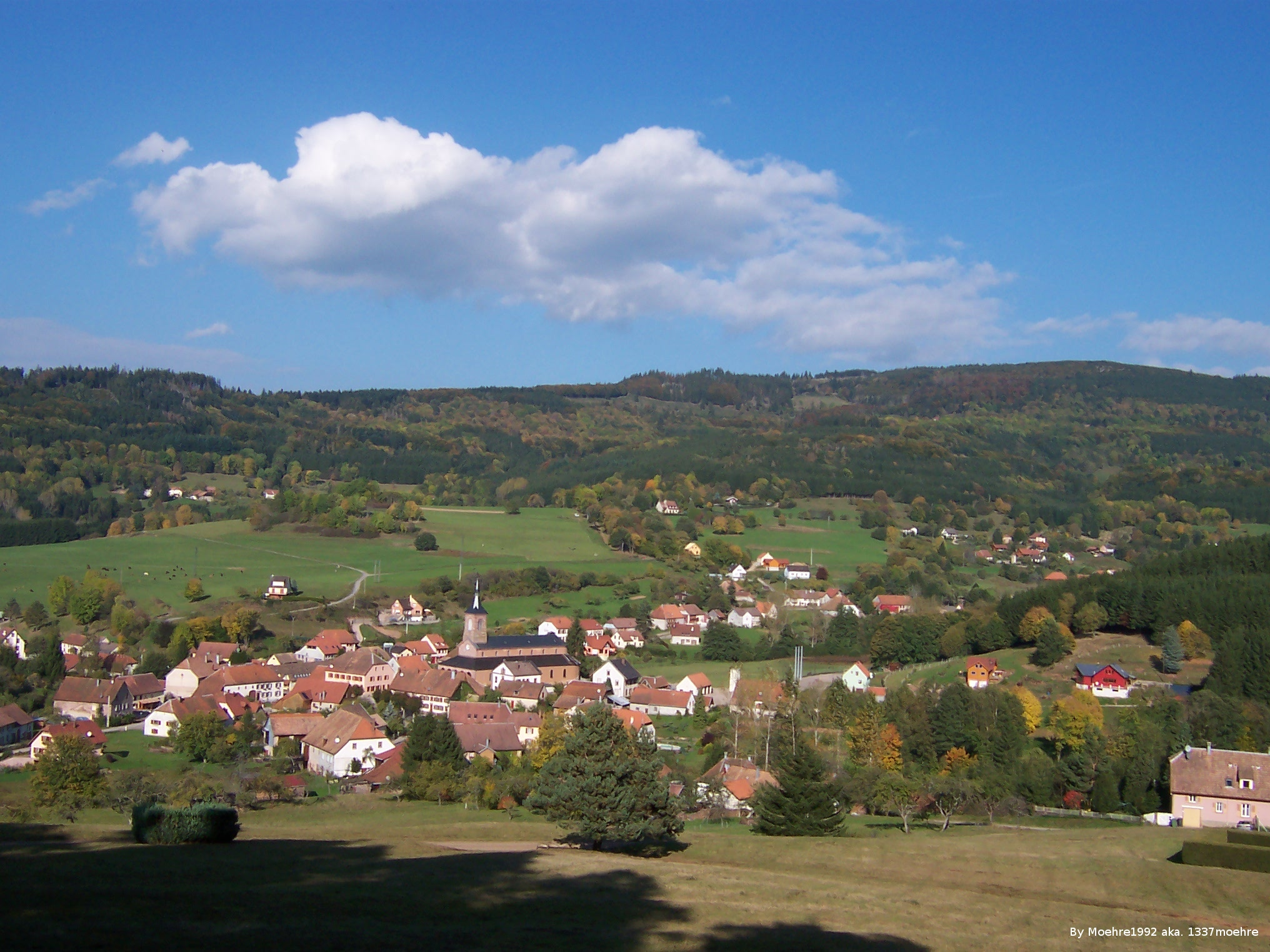 Sicht auf Ranrupt. Vue à Ranrupt.